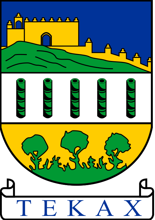 Escudo de la ciudad de Tekax, Yucatán, México